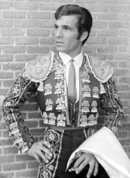 Torero canario